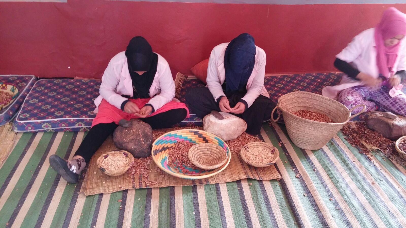 נשים בקואופרטיב ייצור שמן ארגן במרוקו